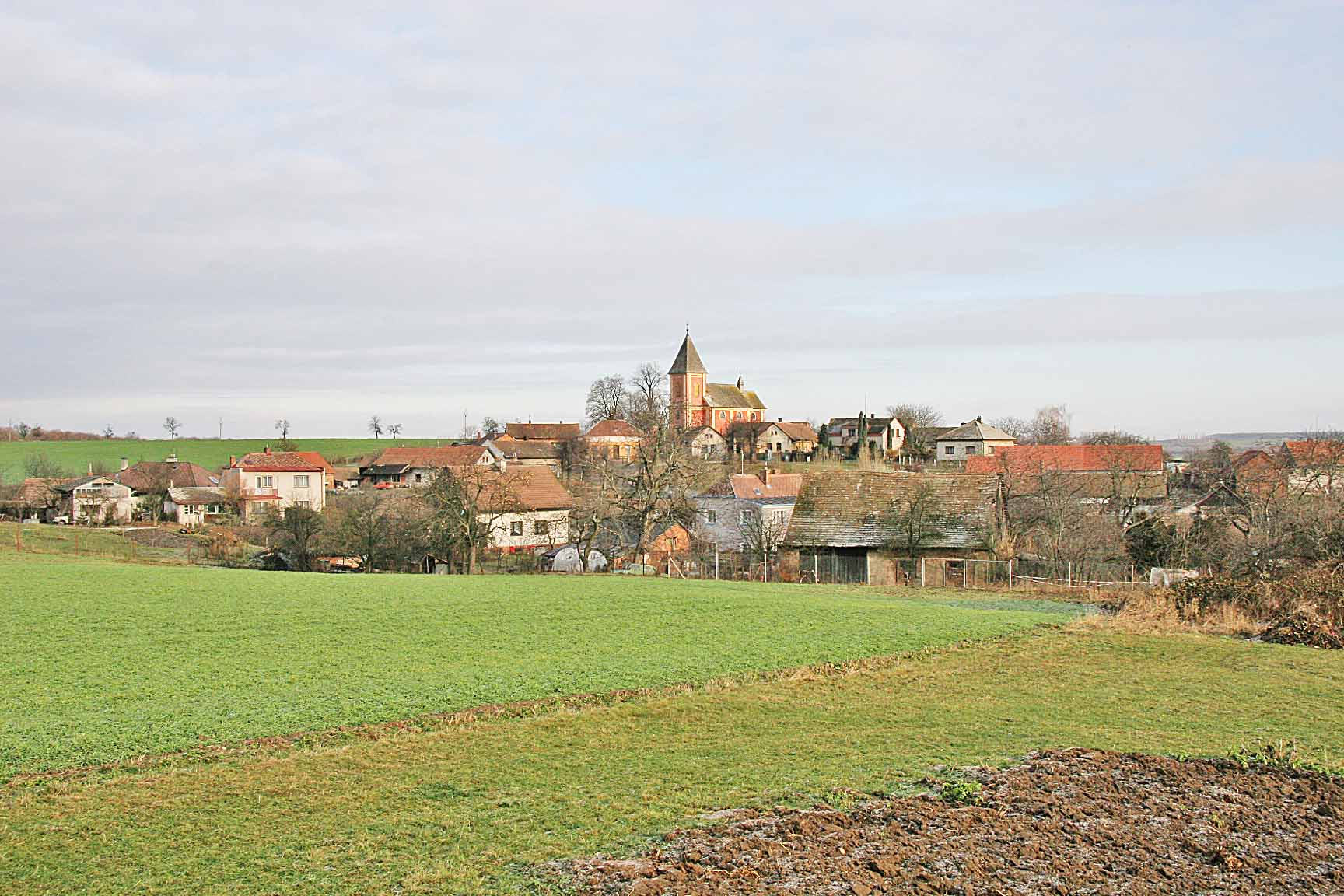 obec Hrádek v okrese Hradec Králové